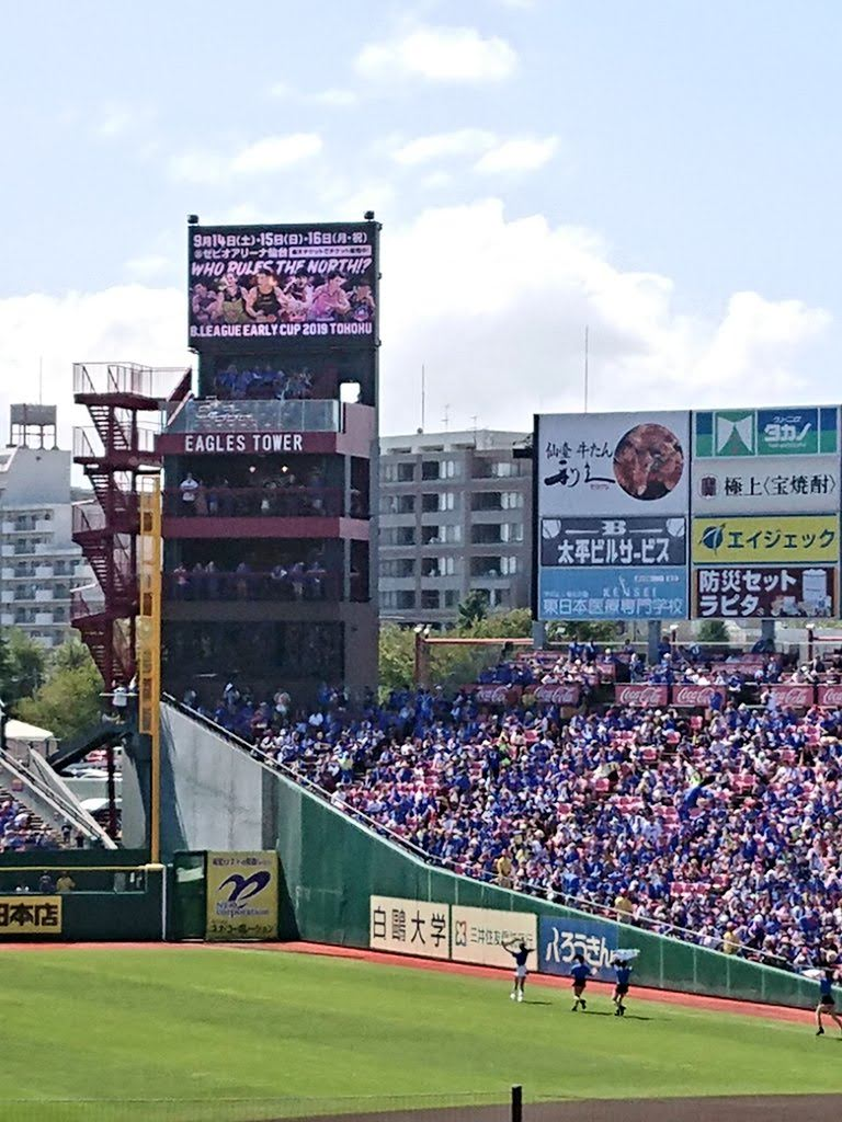 楽天生命パーク宮城に設置された観客席「イーグルスタワー」